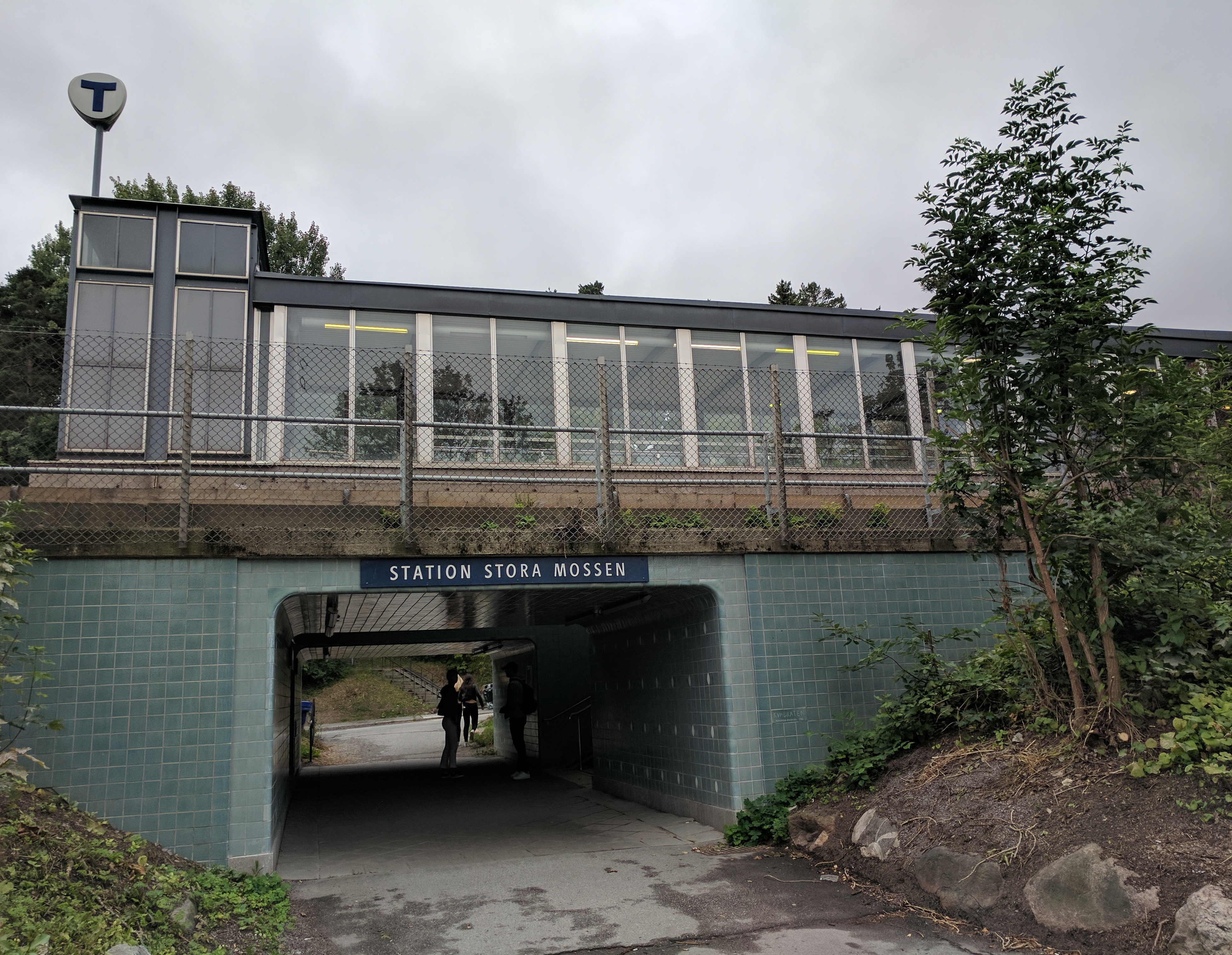 Stora Mossen